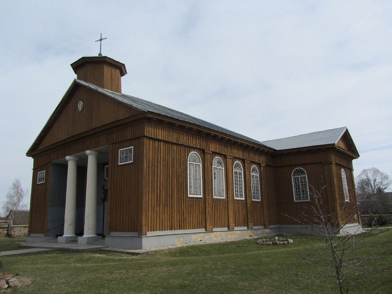 Жырмуны. Касцёл Адшукання Святога Крыжа